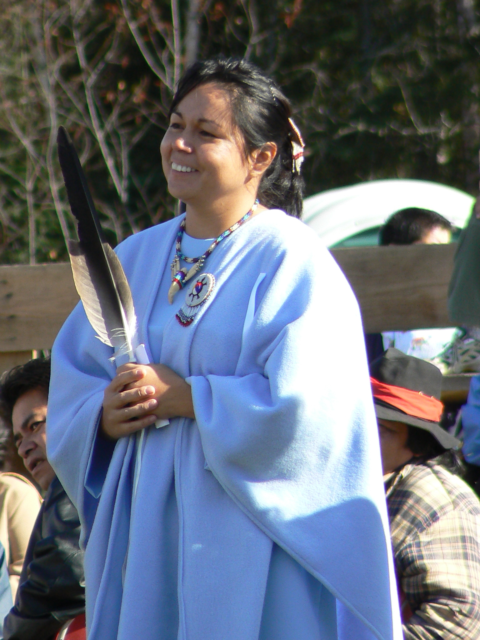 Eva Ottawa